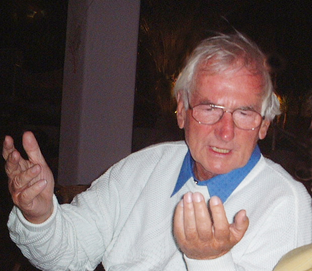 Heinz Ritter in Diskussion